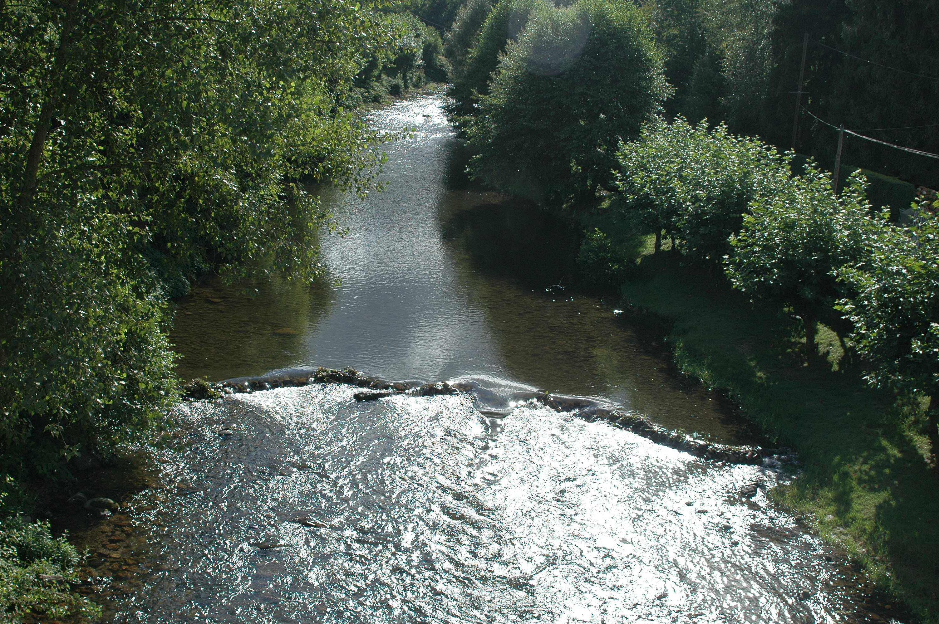 Saint-Étienne-de-Baïgorry, petit barrage sur la Nive des Aldudes, affluent de la Nive. Photo prise le 03/08/06 par Harrieta171